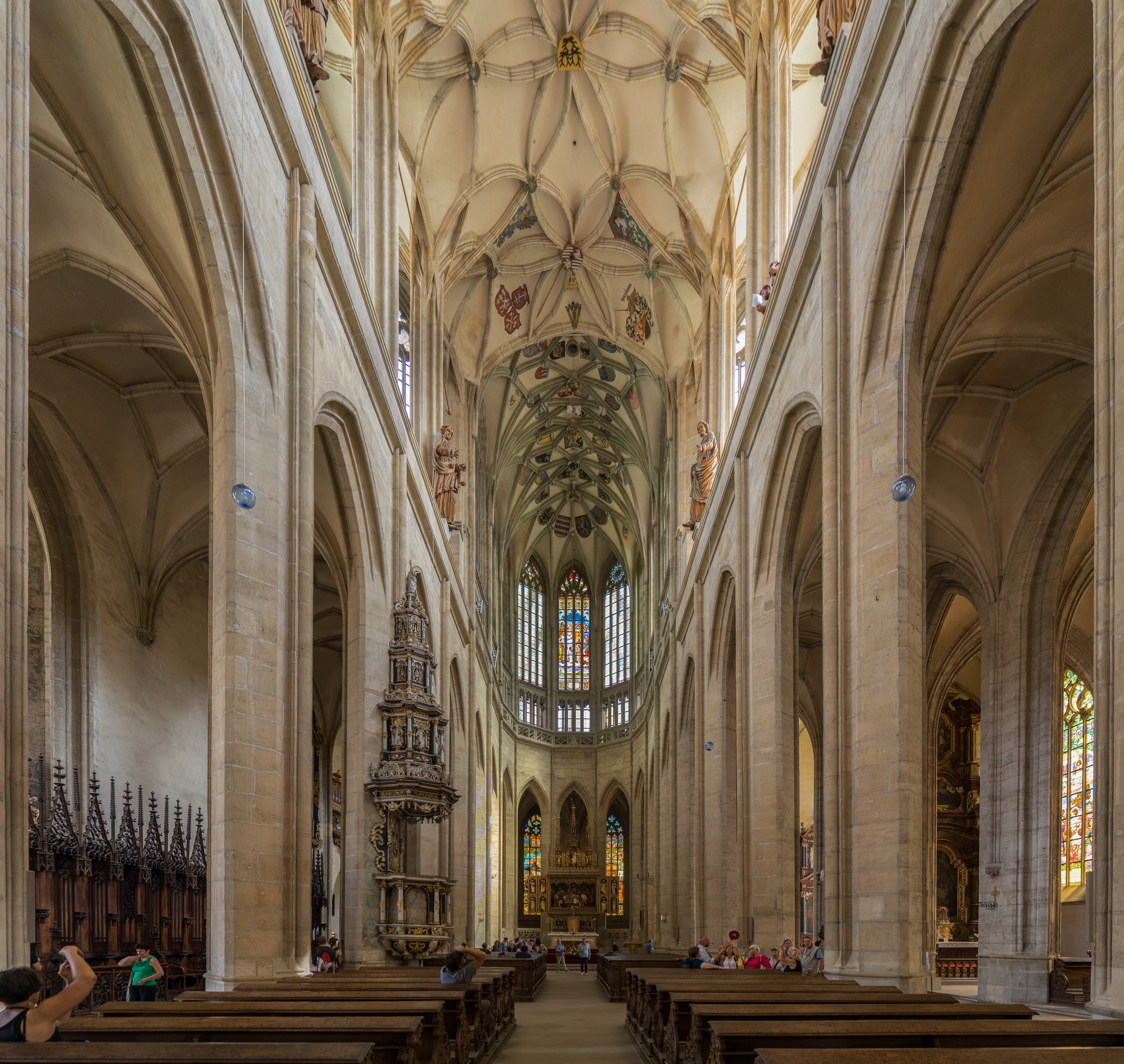 Church of Saint Barbara, Interiour, Kurna Hora